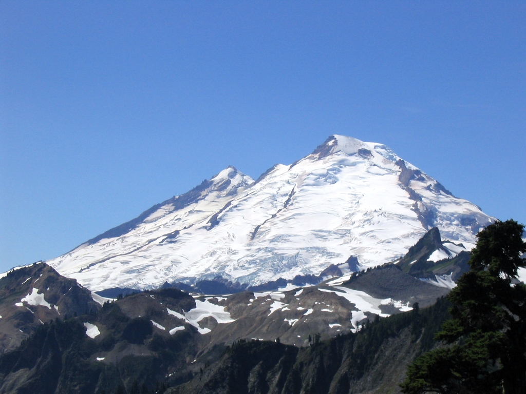 Mt. Baker: Mt. Baker, WA, USA from Artists' Point